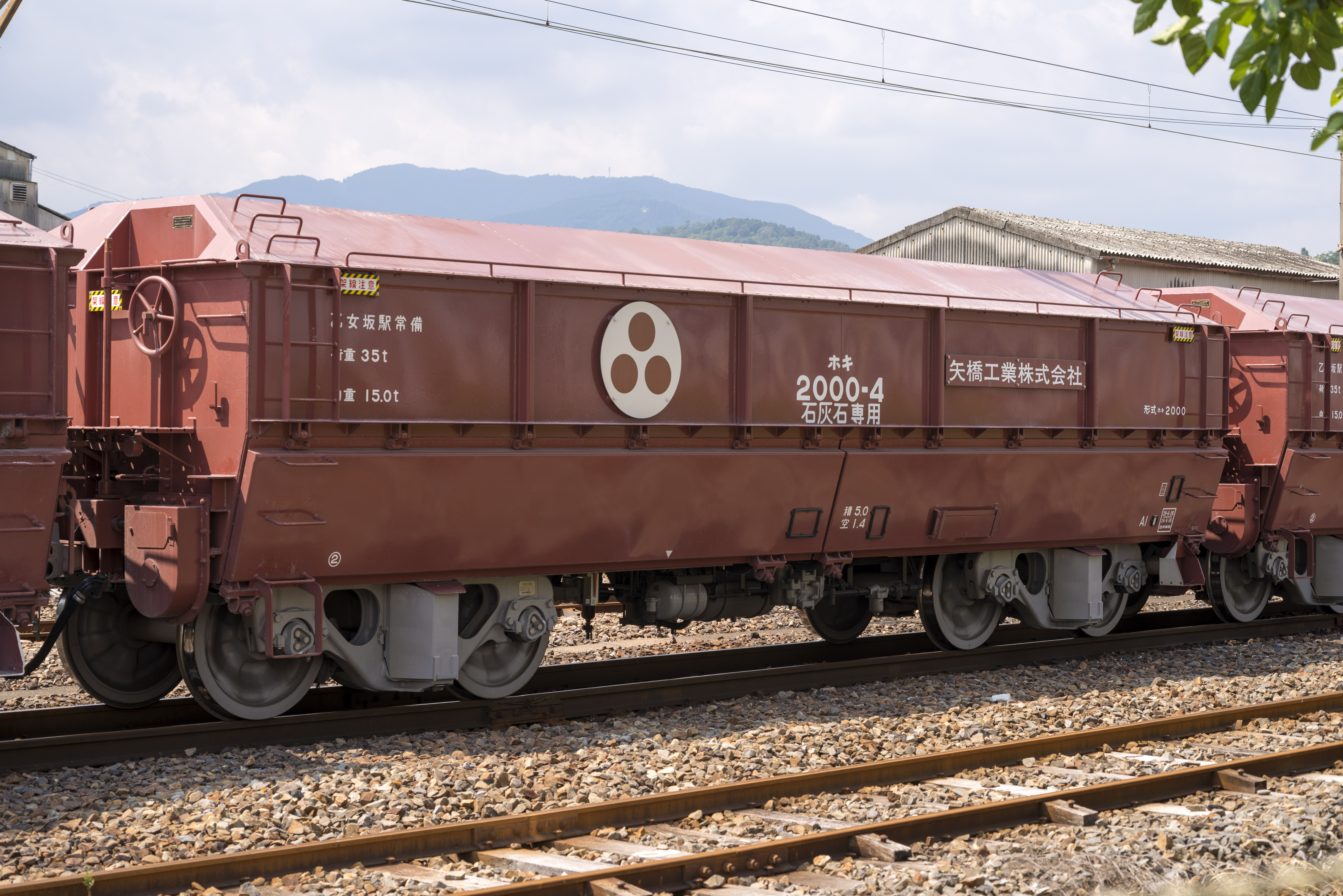 JR貨物ホキ2000形貨車ホキ2000-4